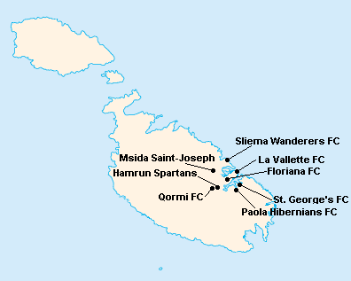 Répartition des clubs en First Division Maltaise 1967-1968.